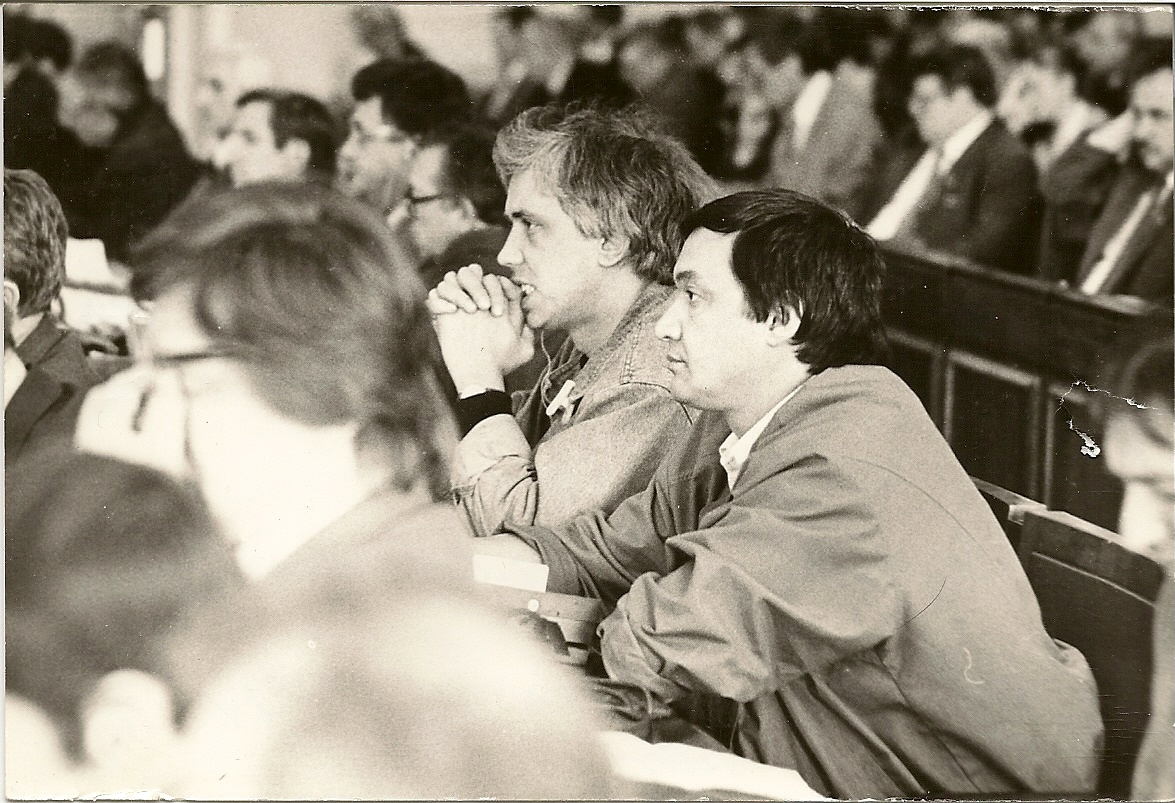 Soviet TV ancors Politkovsky & Mukusev